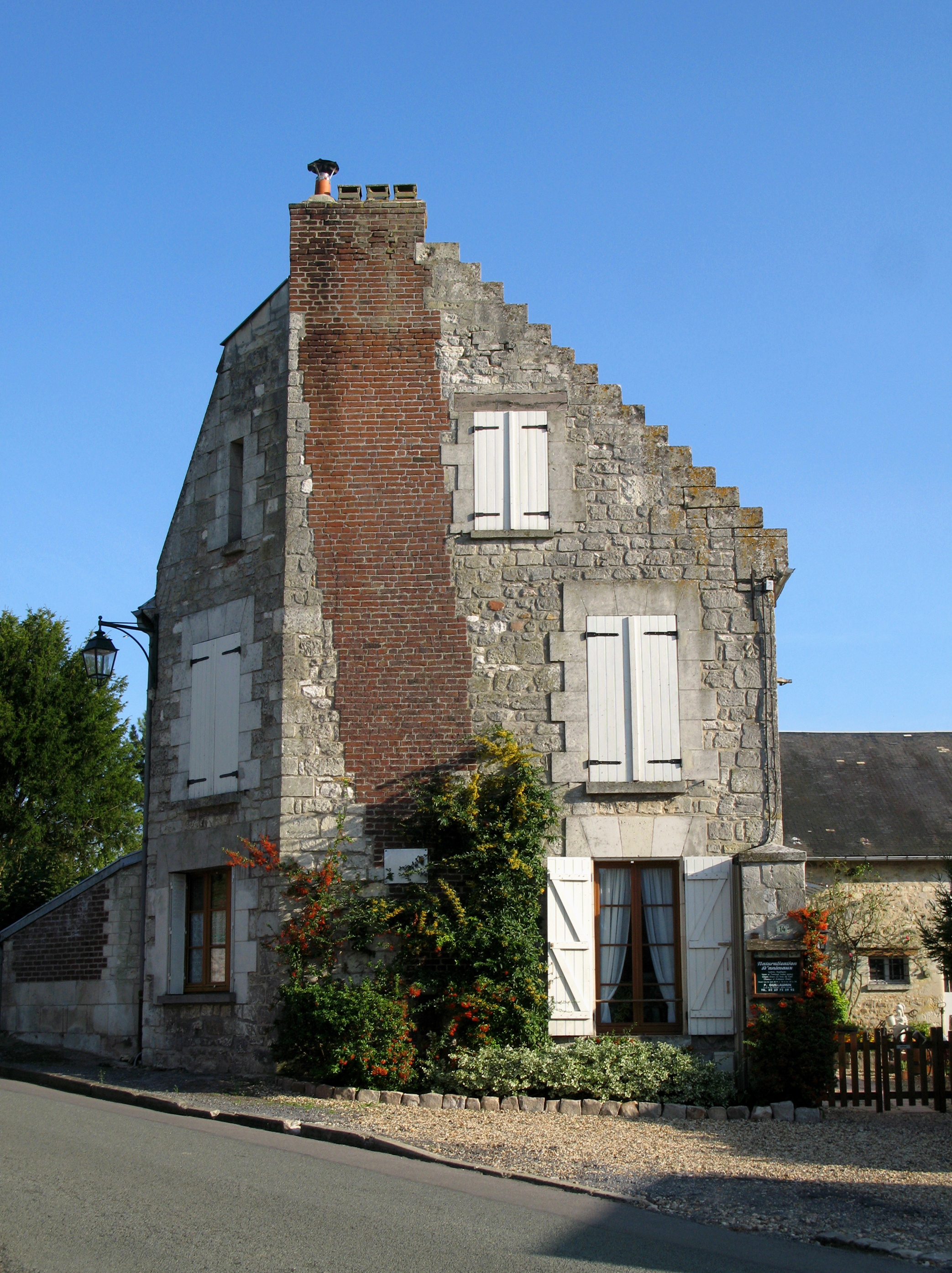 Louâtre (Aisne, France) - Maison (à proximité de l'église) dont le pignon fait nettement apparaître le trajet de la cheminée, construite dans un matériau différent (brique) du reste de la bâtisse (pierre). Cette particularité s'observe assez fréquemment dans la région. .